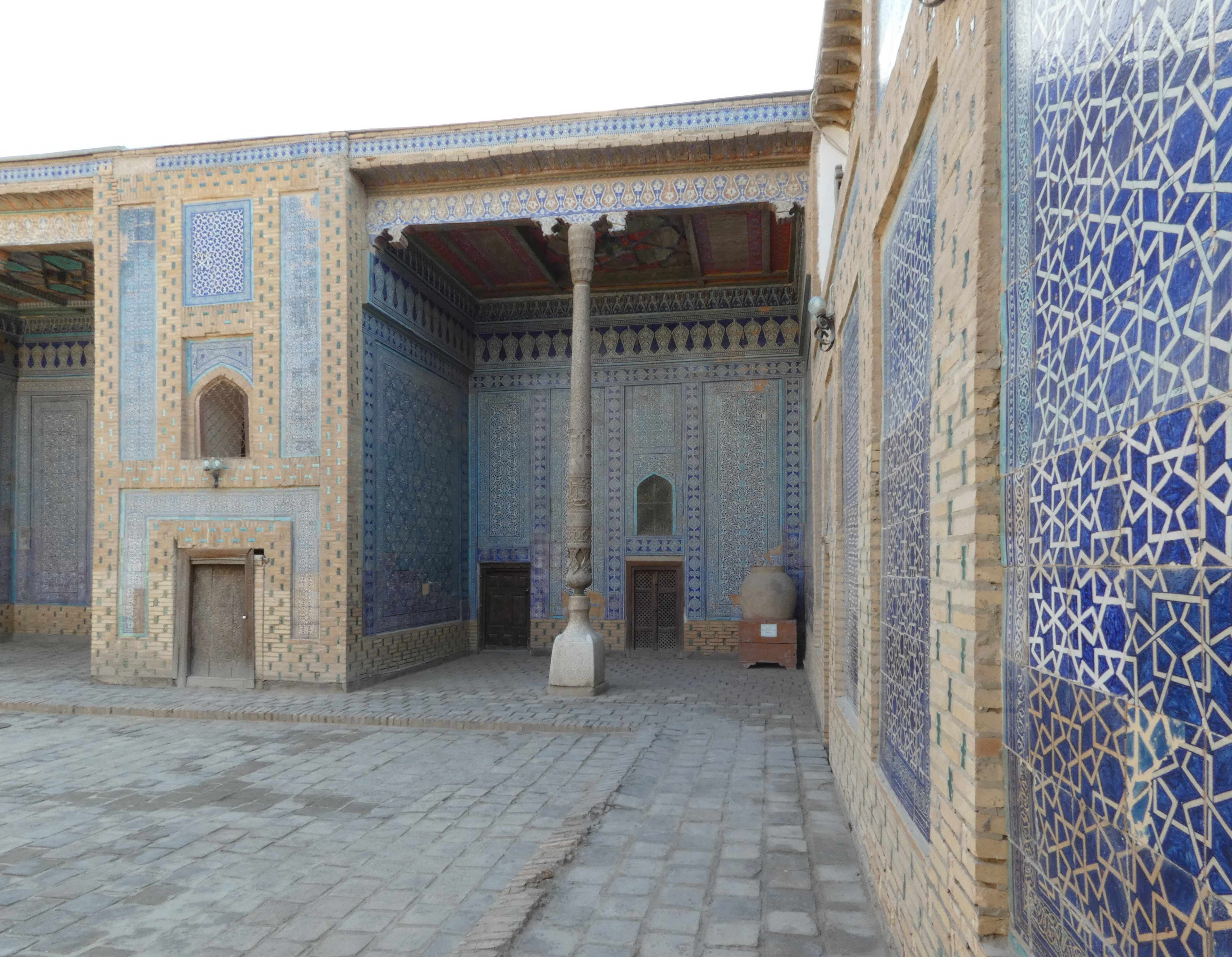 Iwan im Harem Tasch Haulis, Chiwa